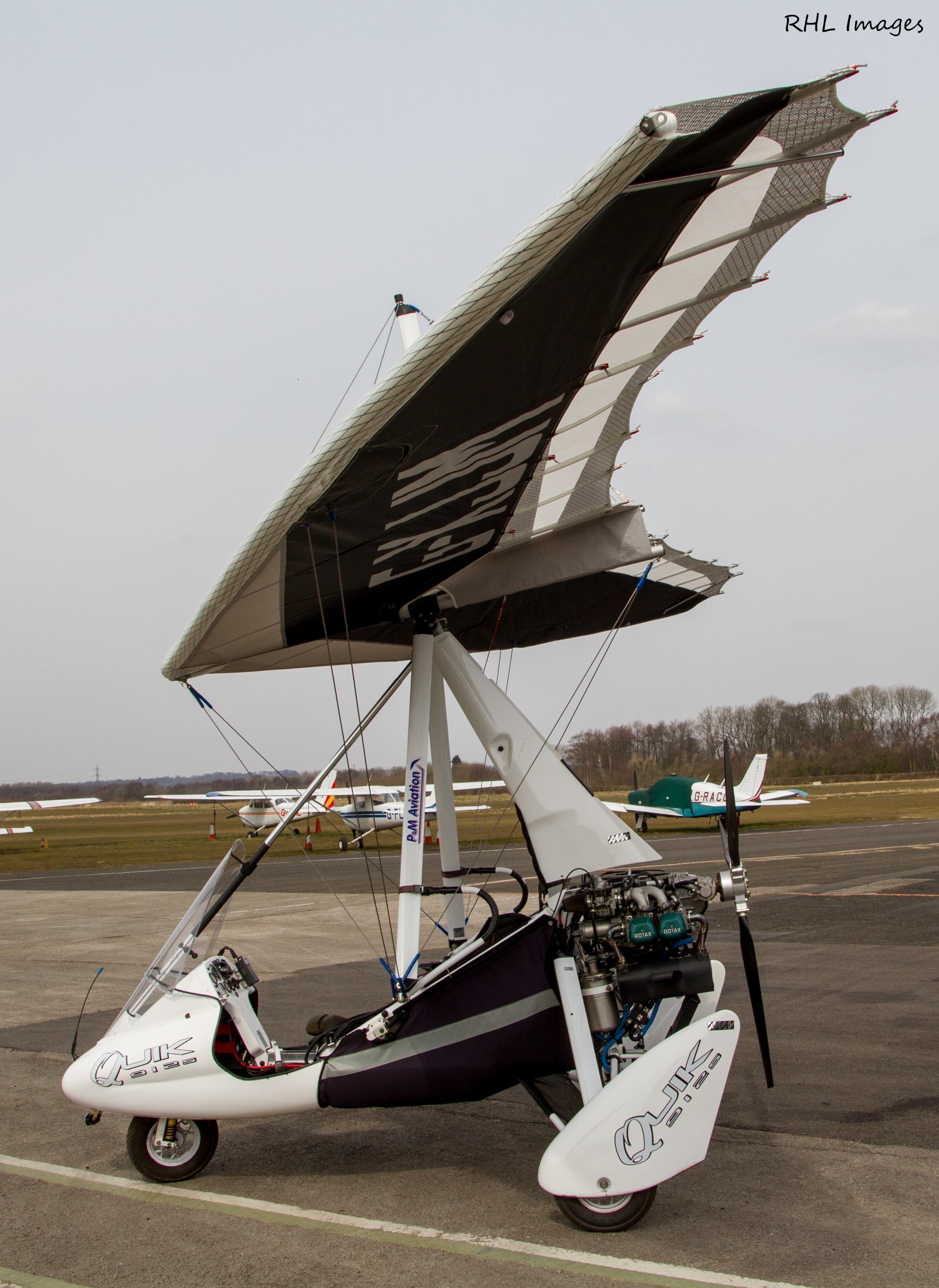 Manchester Barton 07.04.13.